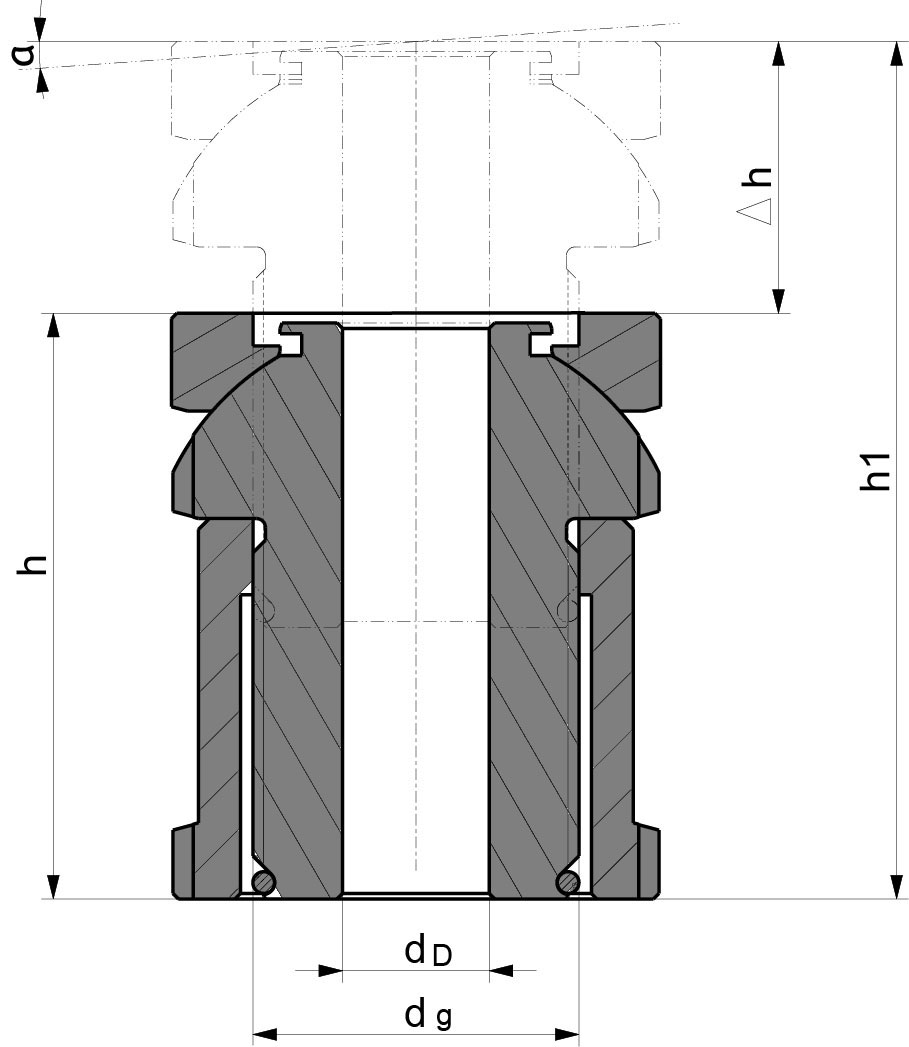 Niveauausgleichselement (technische Zeichnung)